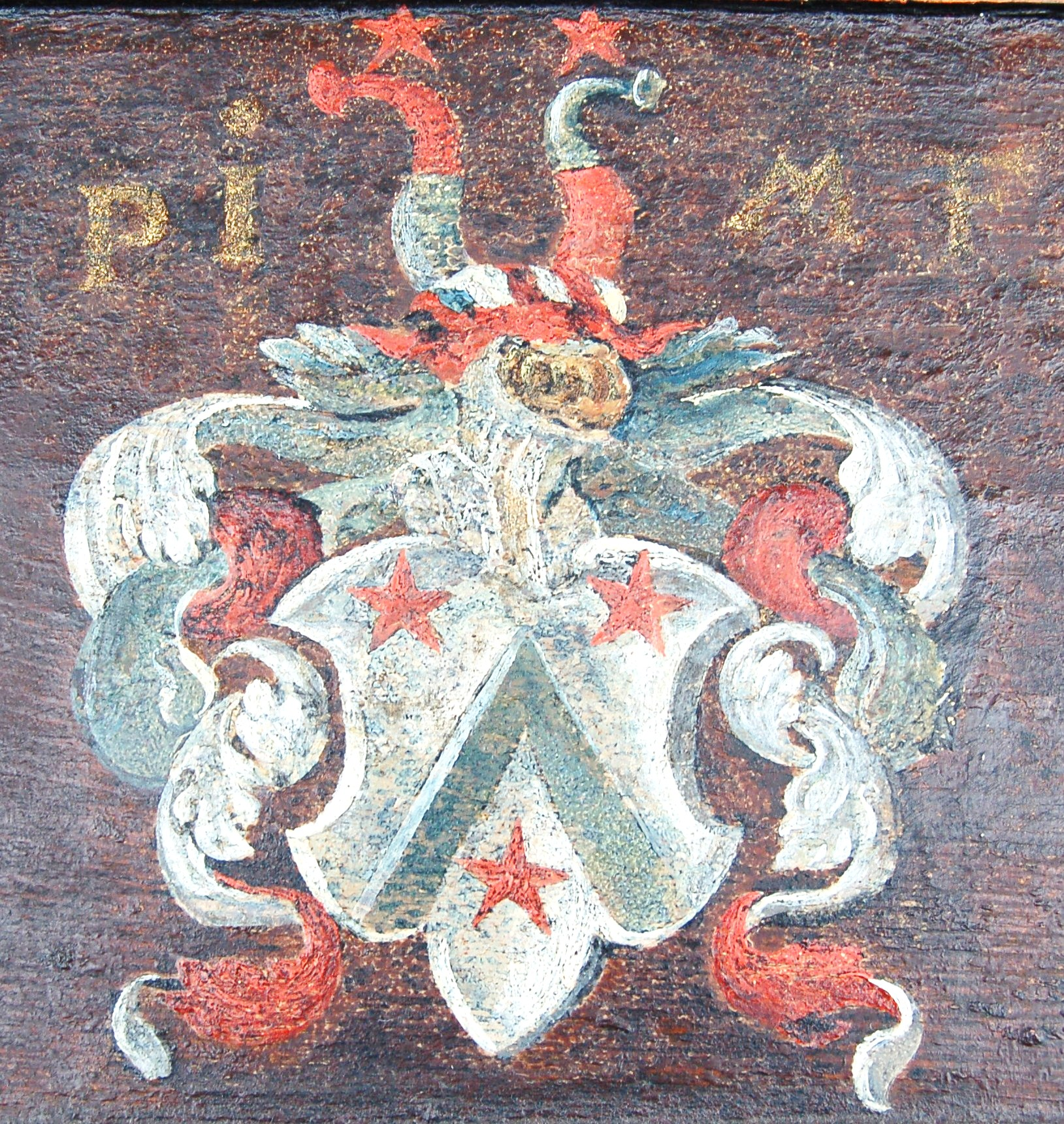 Våpenskjolf Galde i Tanum kirke